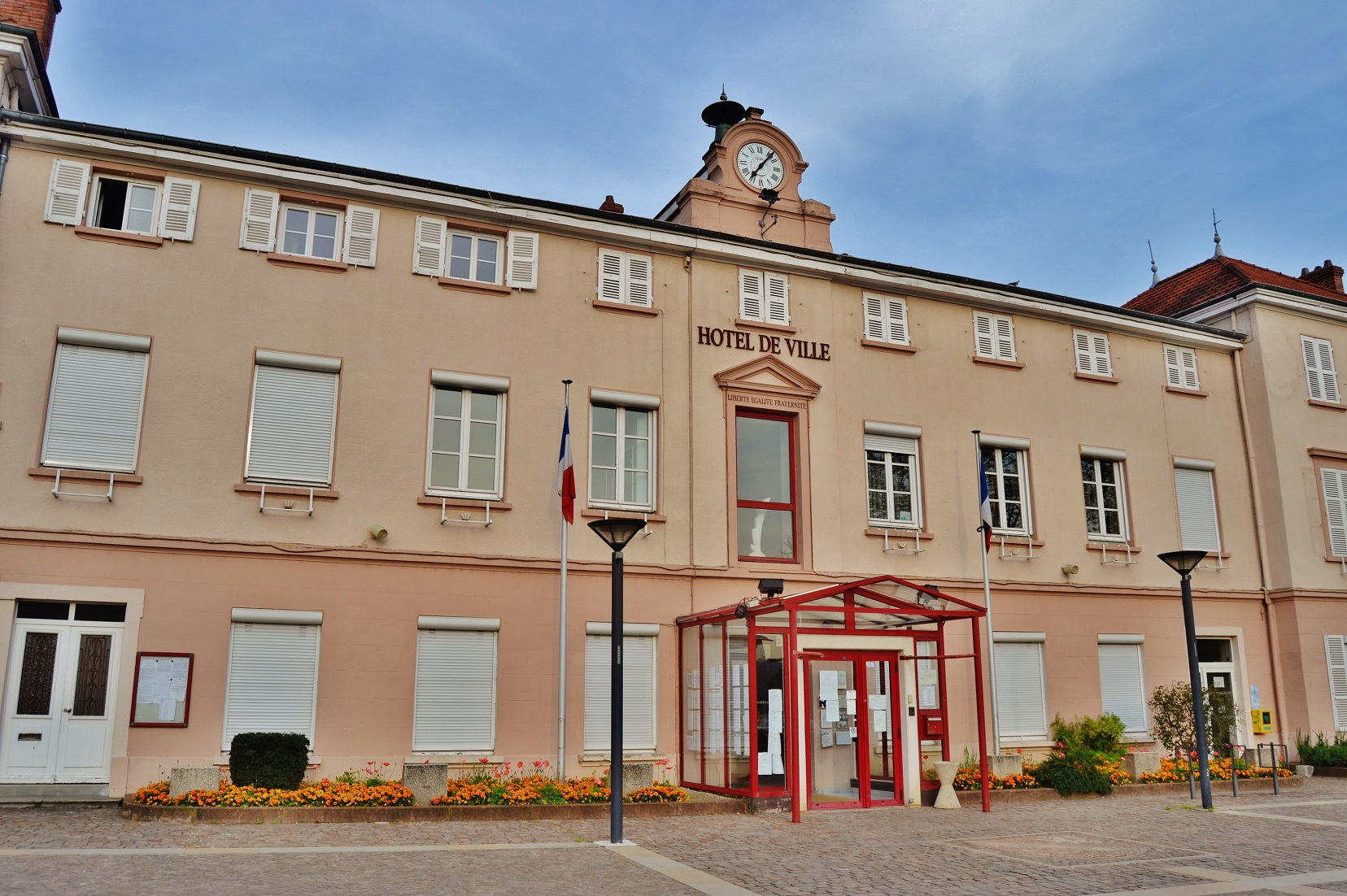 Hotel-de-Ville